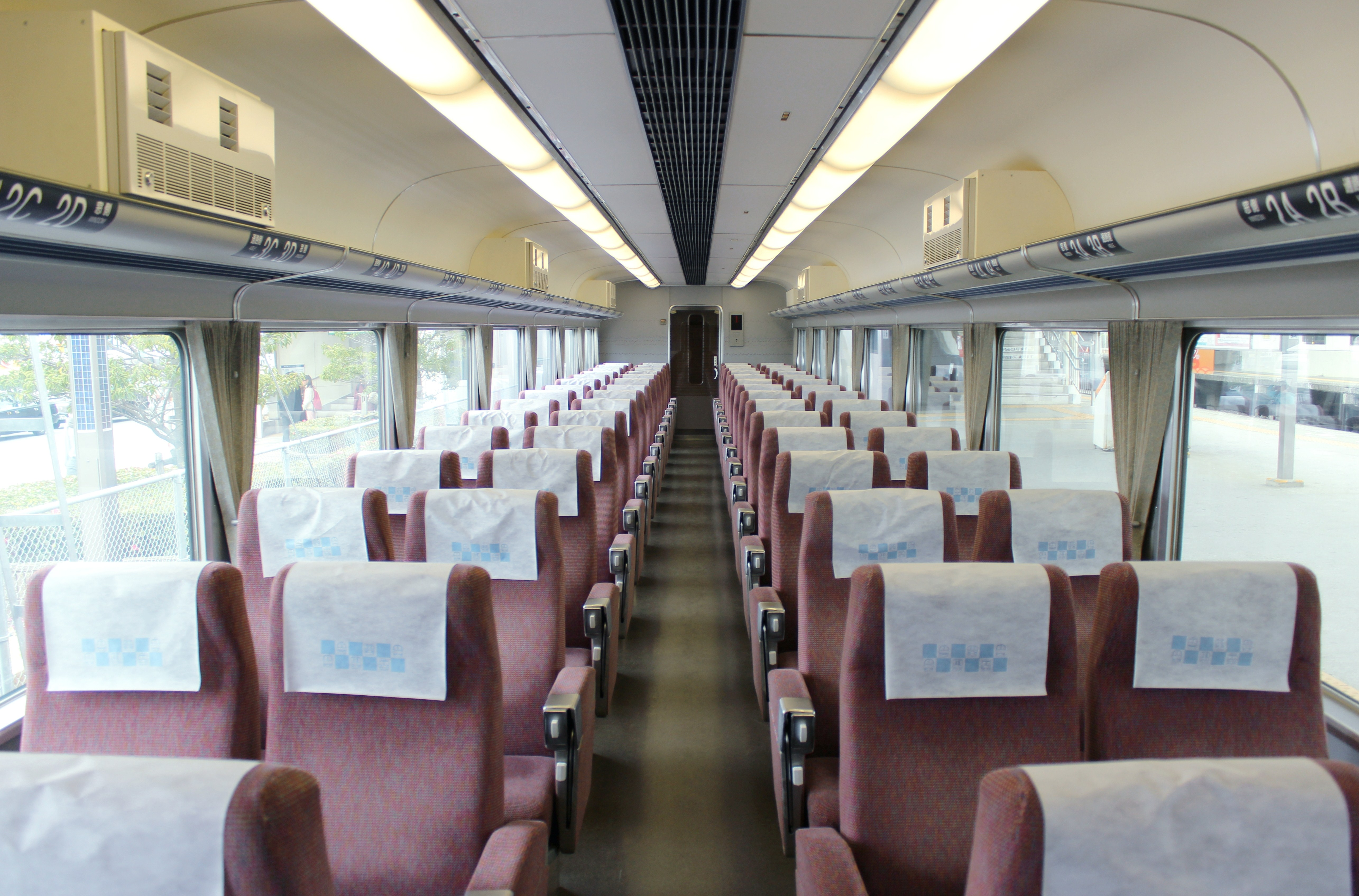 近鉄12400系リニューアル後の客室